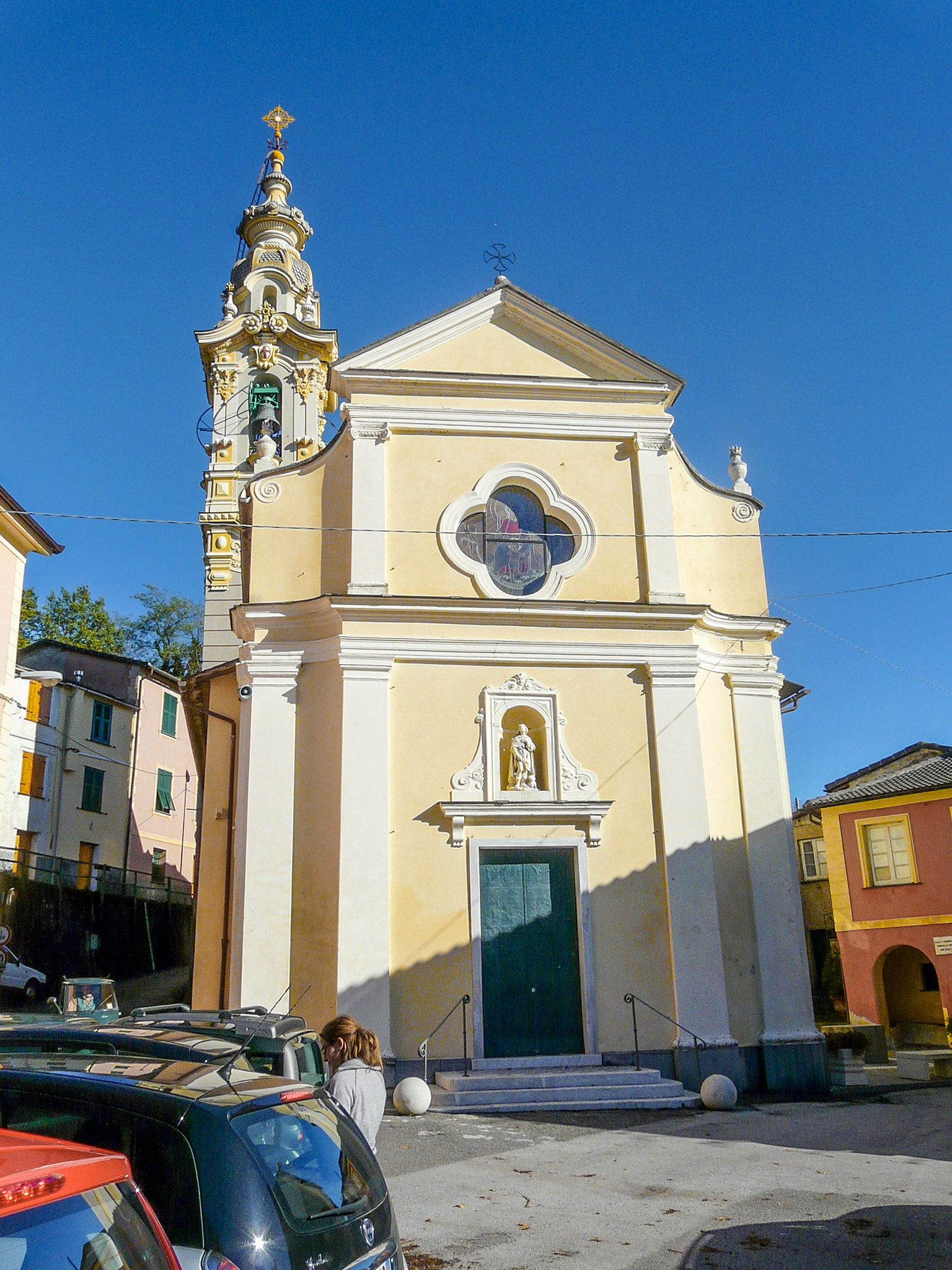 Chiesa di San Rocco, Ognio, Neirone, Liguria, Italia